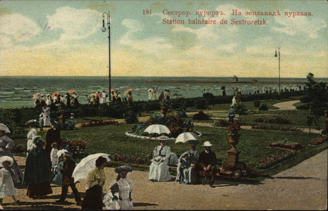 Сестрорецкий курзал